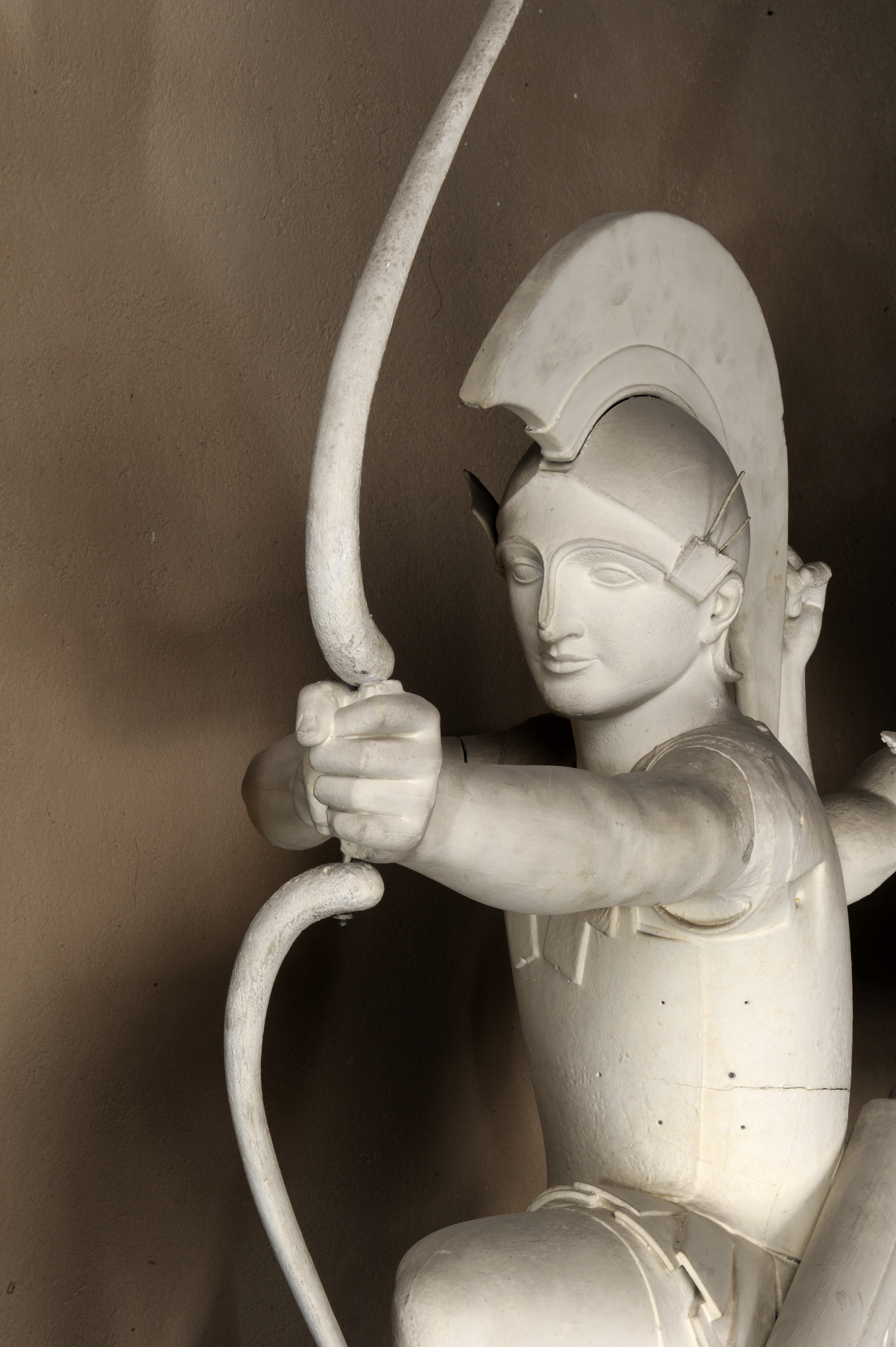 Oeuvre du musée Adolf Michaelis